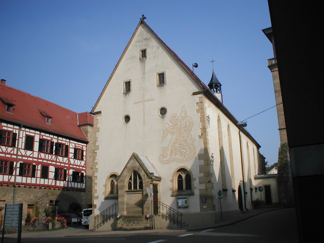 Nikolaikirche in Neuenstadt am Kocher.